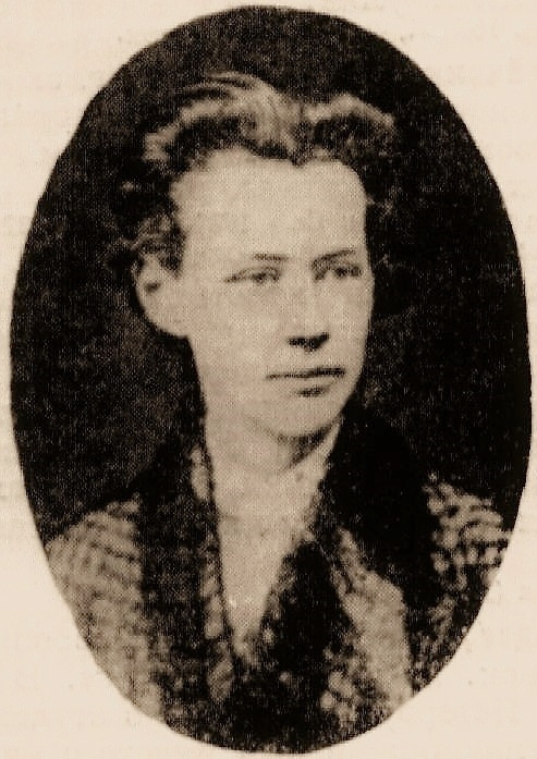 Aleksandra Chorzhevskaja